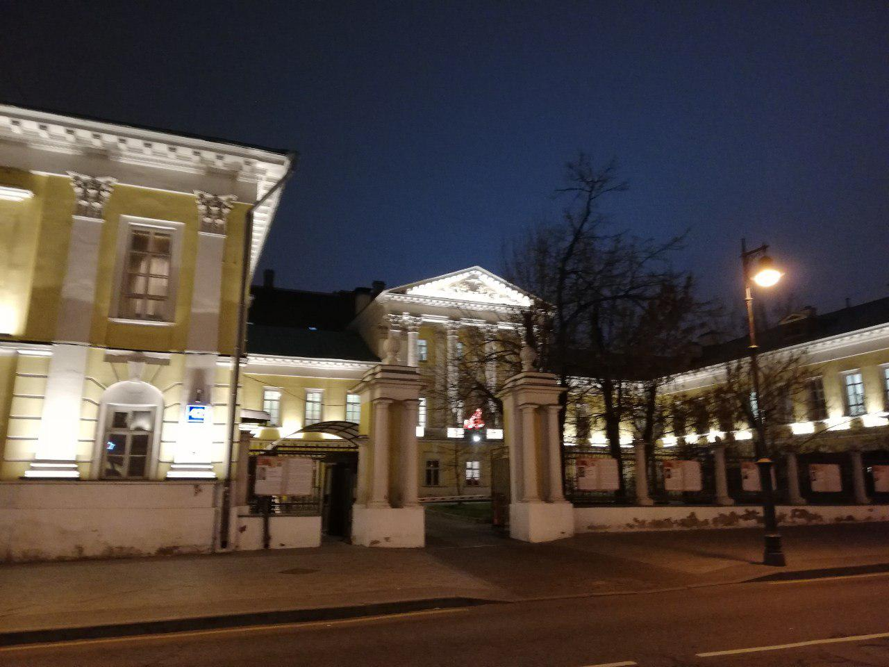 Вечернее освещение усадьбы Барышниковых, 2018